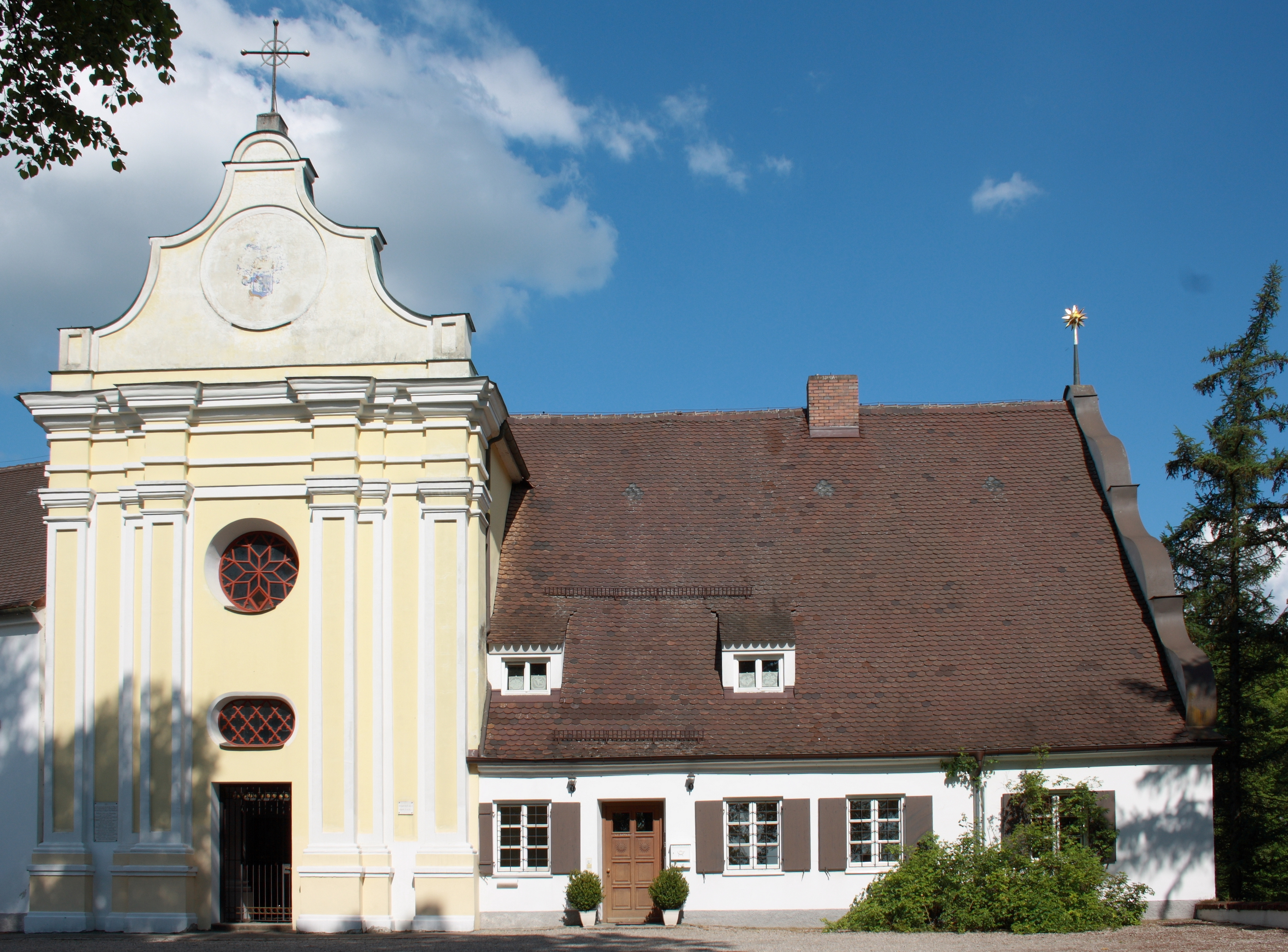 Katholische Kirche St. Matthias und Georg, Schloss Scherneck in Rehling, einer Gemeinde im Landkreis Aichach-Friedberg (Bayern), 1702 bis 1709 erbaut, Westfassade